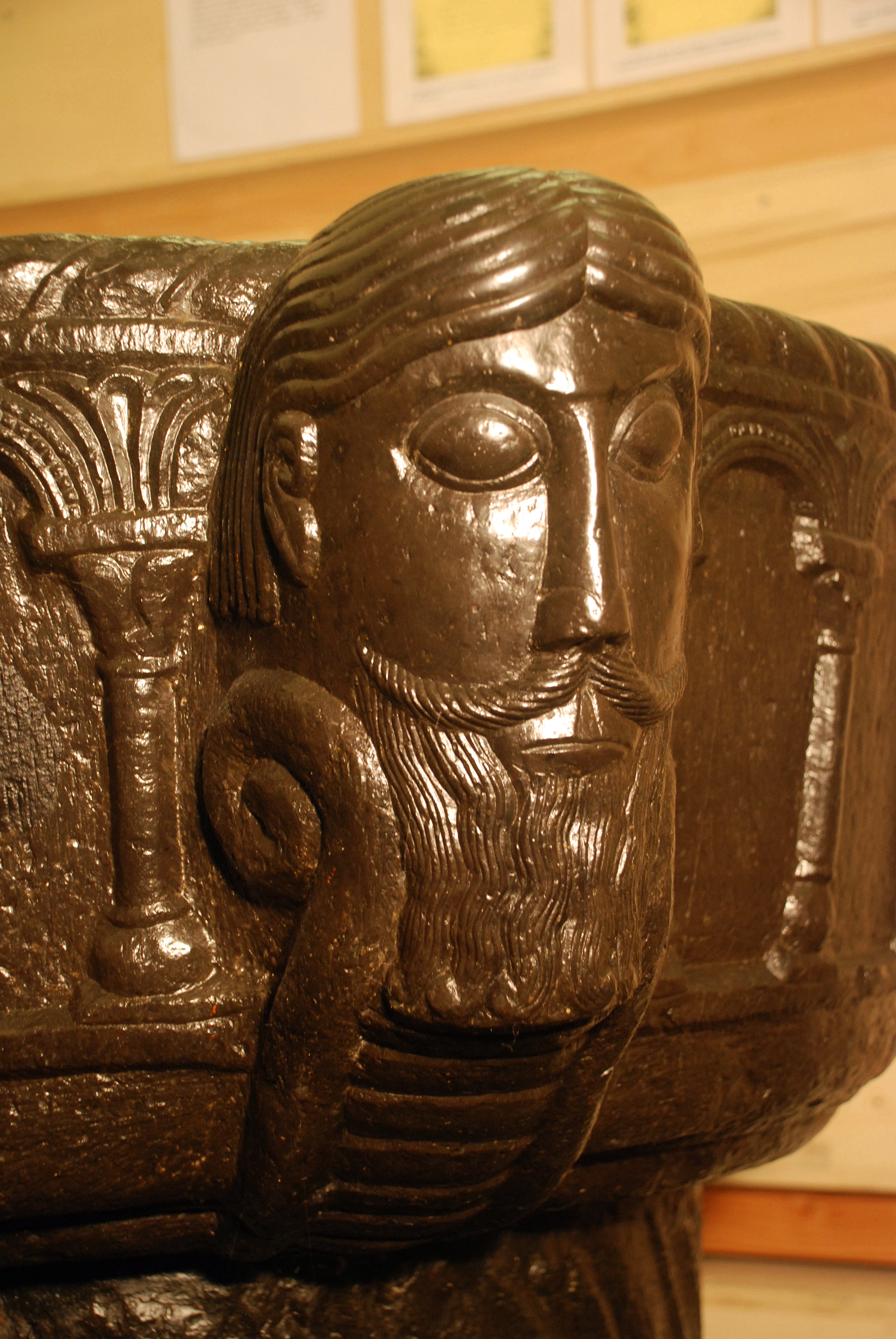 Belgique - Wallonie - Fonts baptismaux de Beauvechain